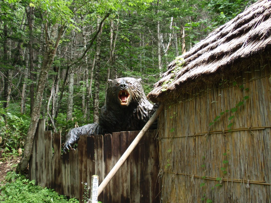 クマー